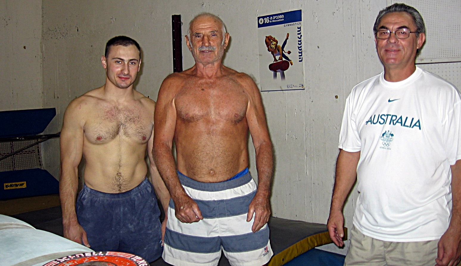 Чемпион Израиля по спортивной гимнастике 2010 года, его тренер Борис Кинев и Ким Вассерман, в прошлом тренер Бориса Кинева